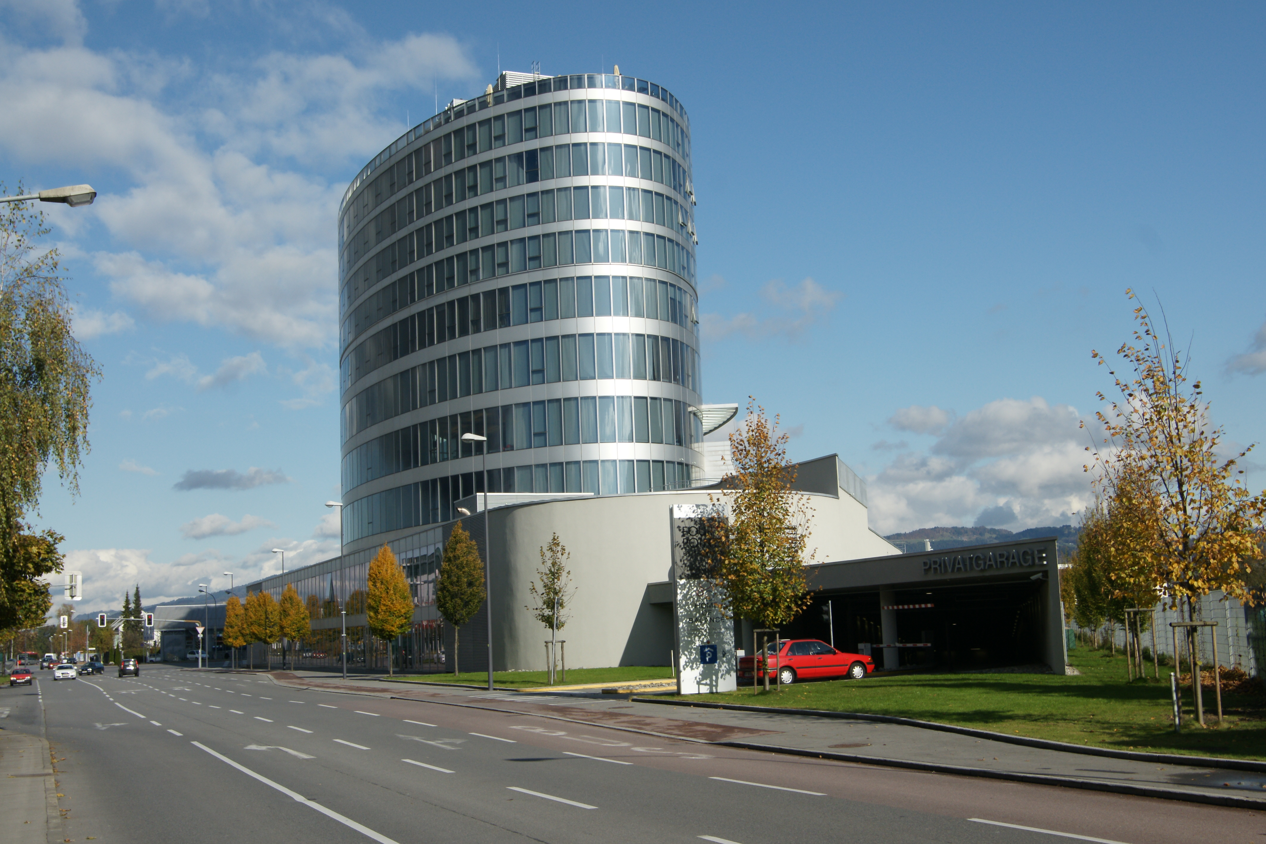 das Panoramahaus Dornbirn (Home Of Balance); Blick vom Messepark.